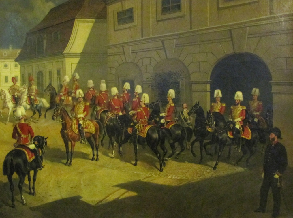 Einreiten der k.k. Ersten Arcieren-Leibgarde in die Gardekaserne am Rennweg nach einer Fronleichnamsprozession, Gemälde im Heeresgeschichtlichen Museum in Wien